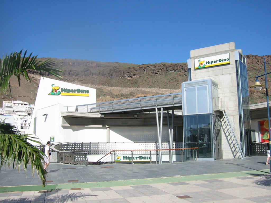 The HiperDino supermarket in Puerto de Mogán, Gran Canaria.